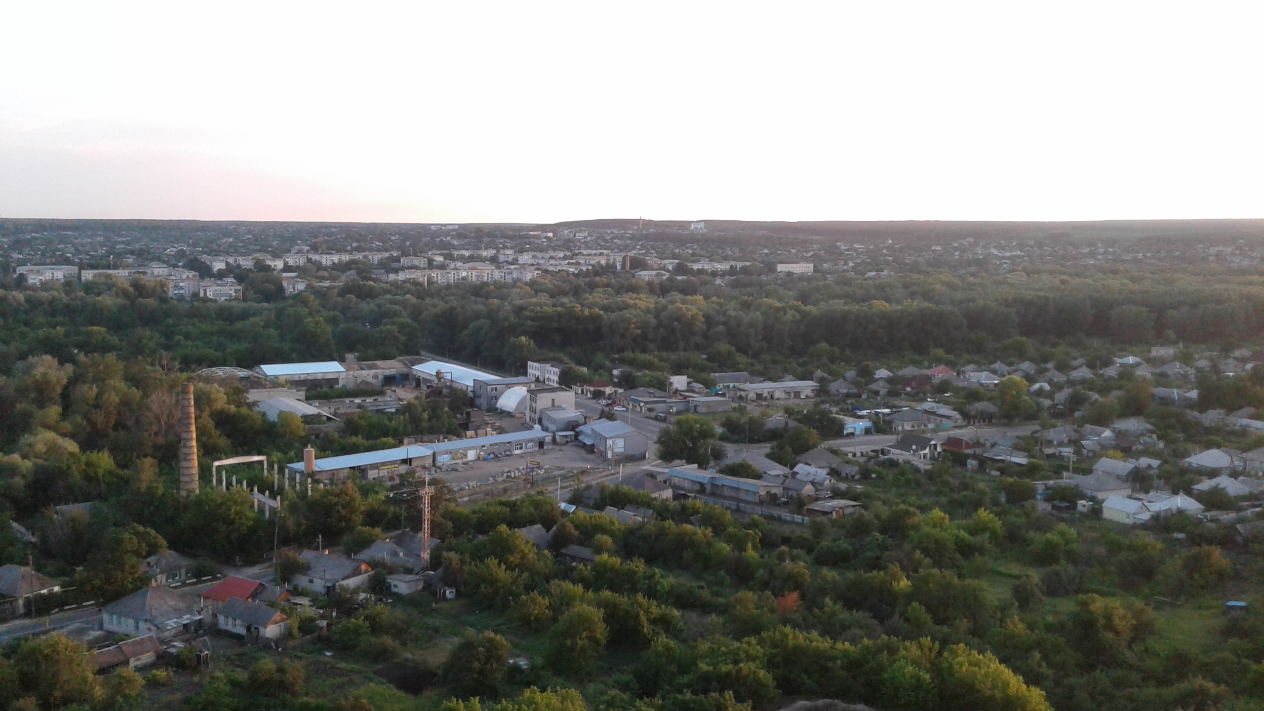 Місто Кремінна з терикону